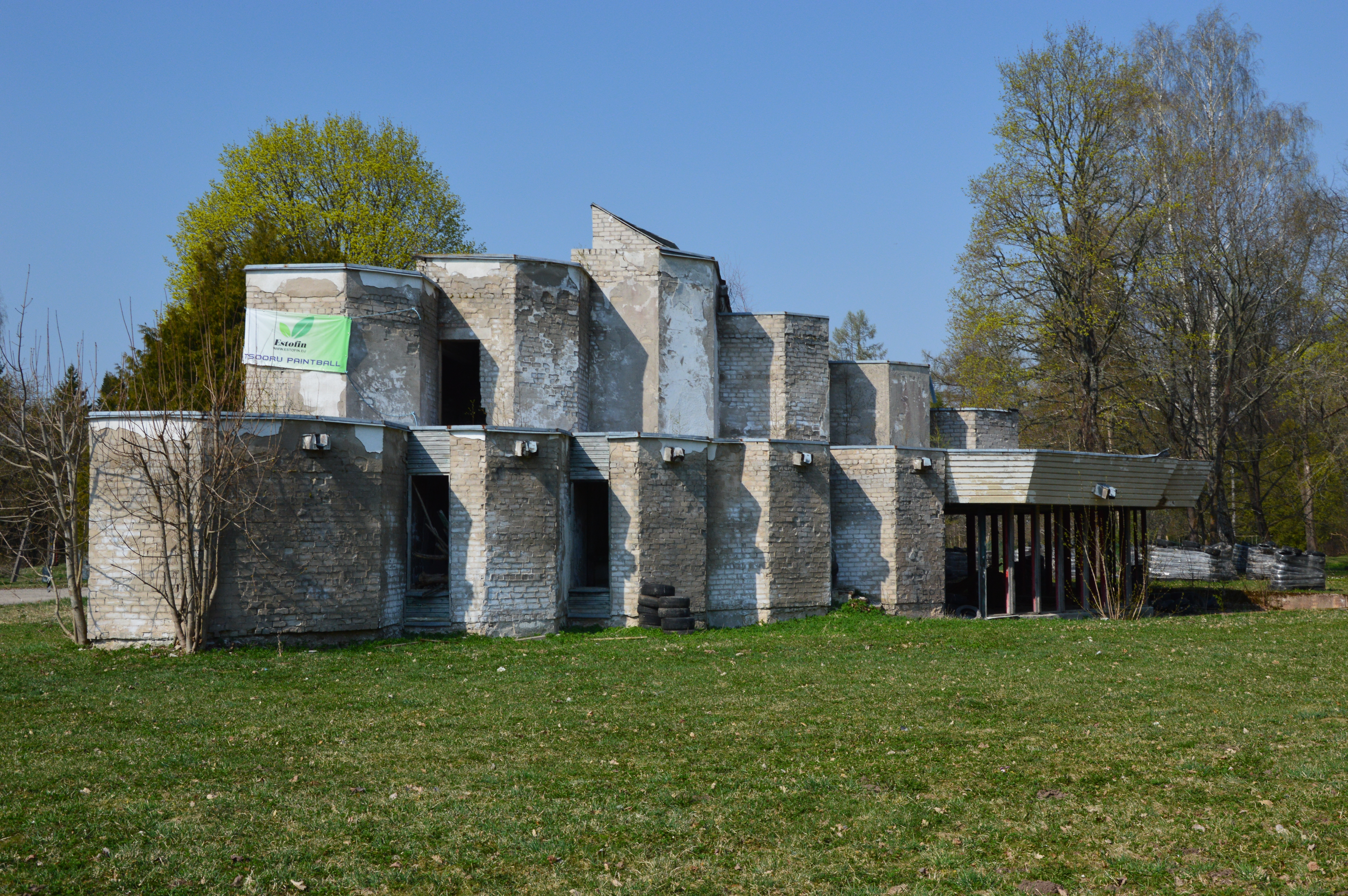 Tsooru kolhoosikeskuse varemed